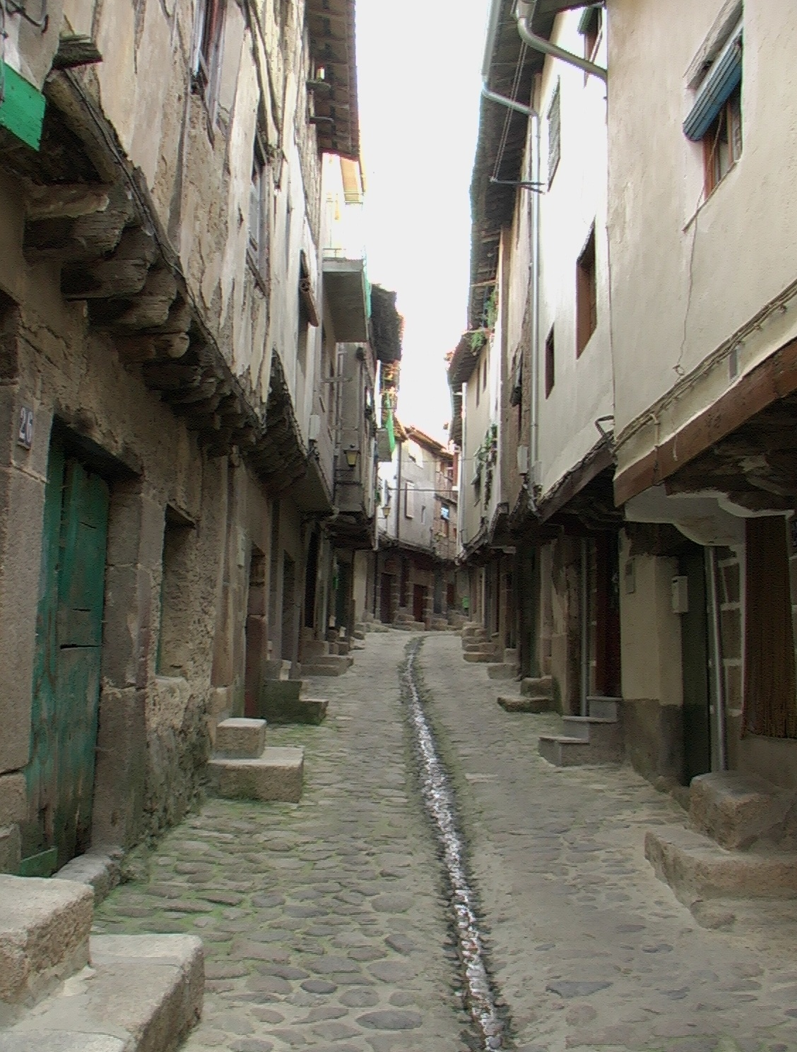 Fotografia de una calle en San Martín de Trevejo